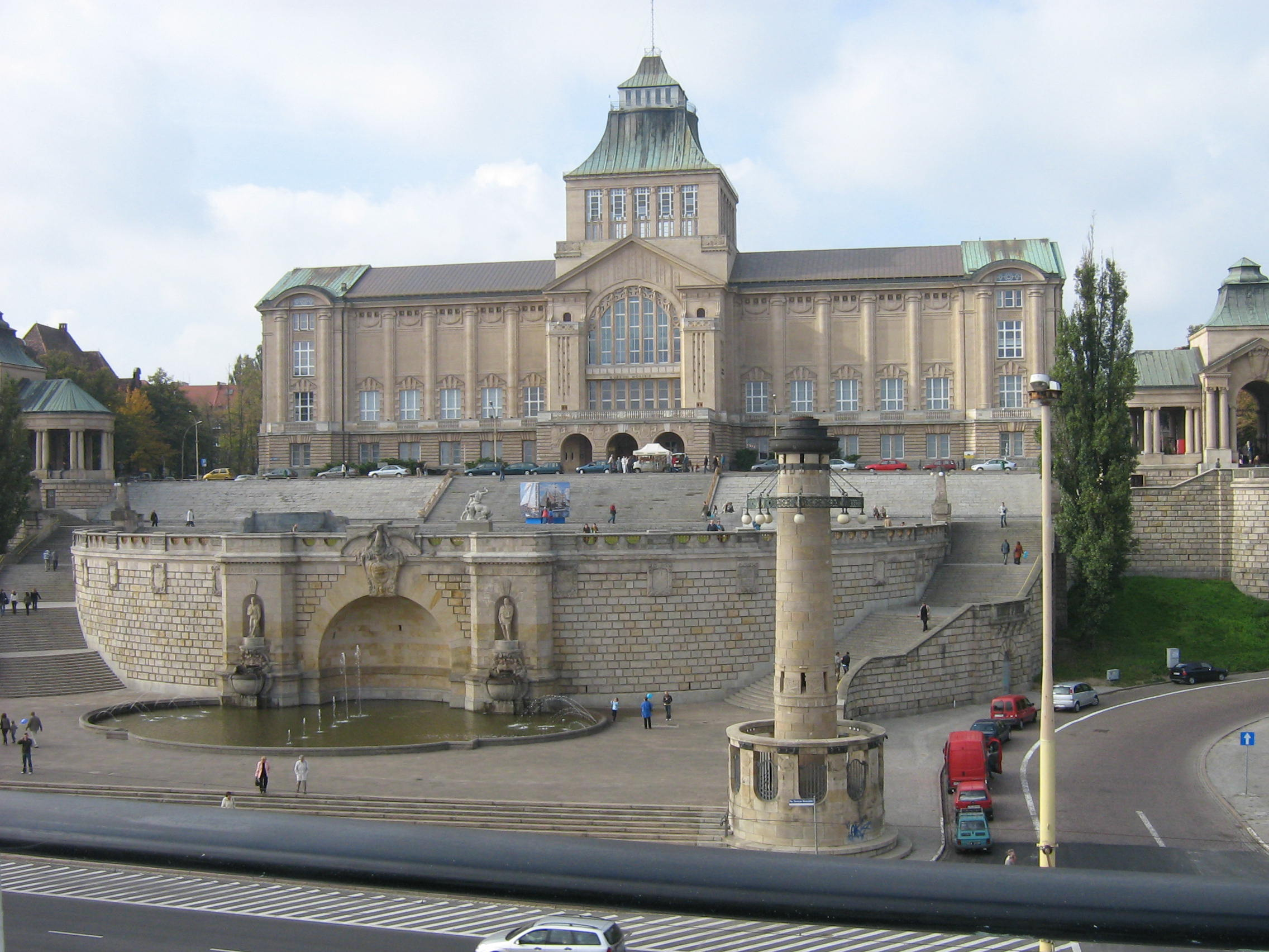 Budynek Muzeum Morskiego oraz Teatru Współczesnego w Szczecinie